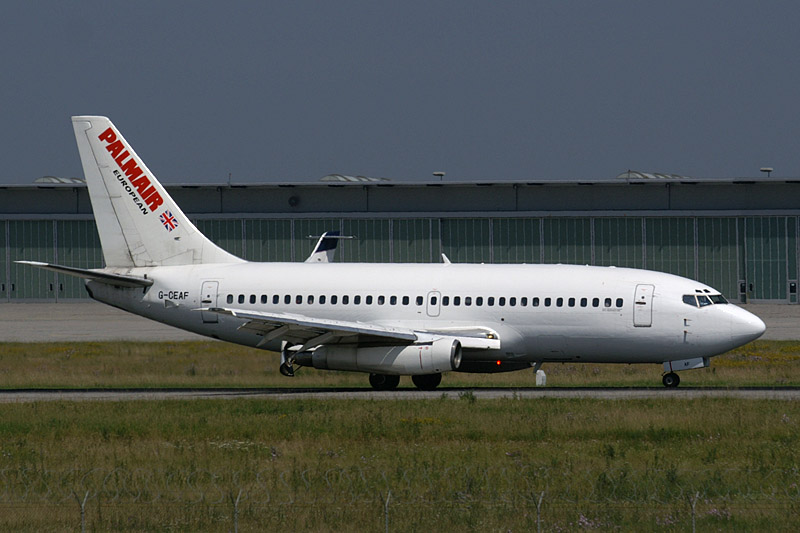 Palmair Boeing 737-200 G-CEAF